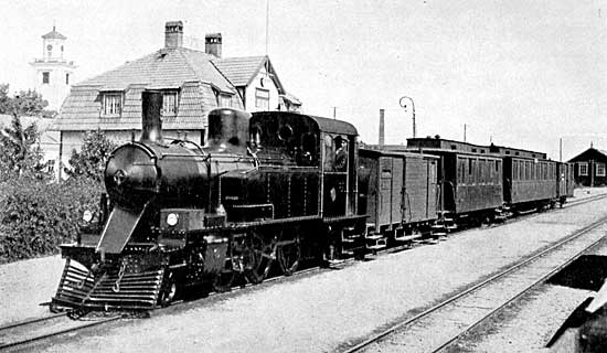 Mönsterås railway station at Mönsterås-Åseda Järnväg, Sweden